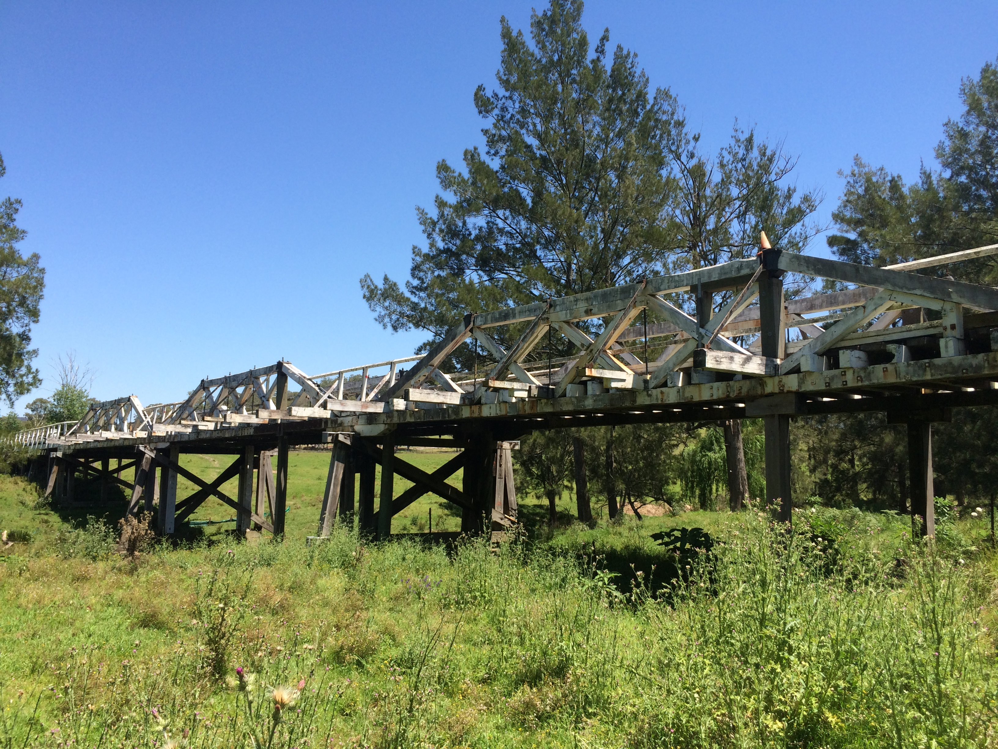 Monkerai Bridge